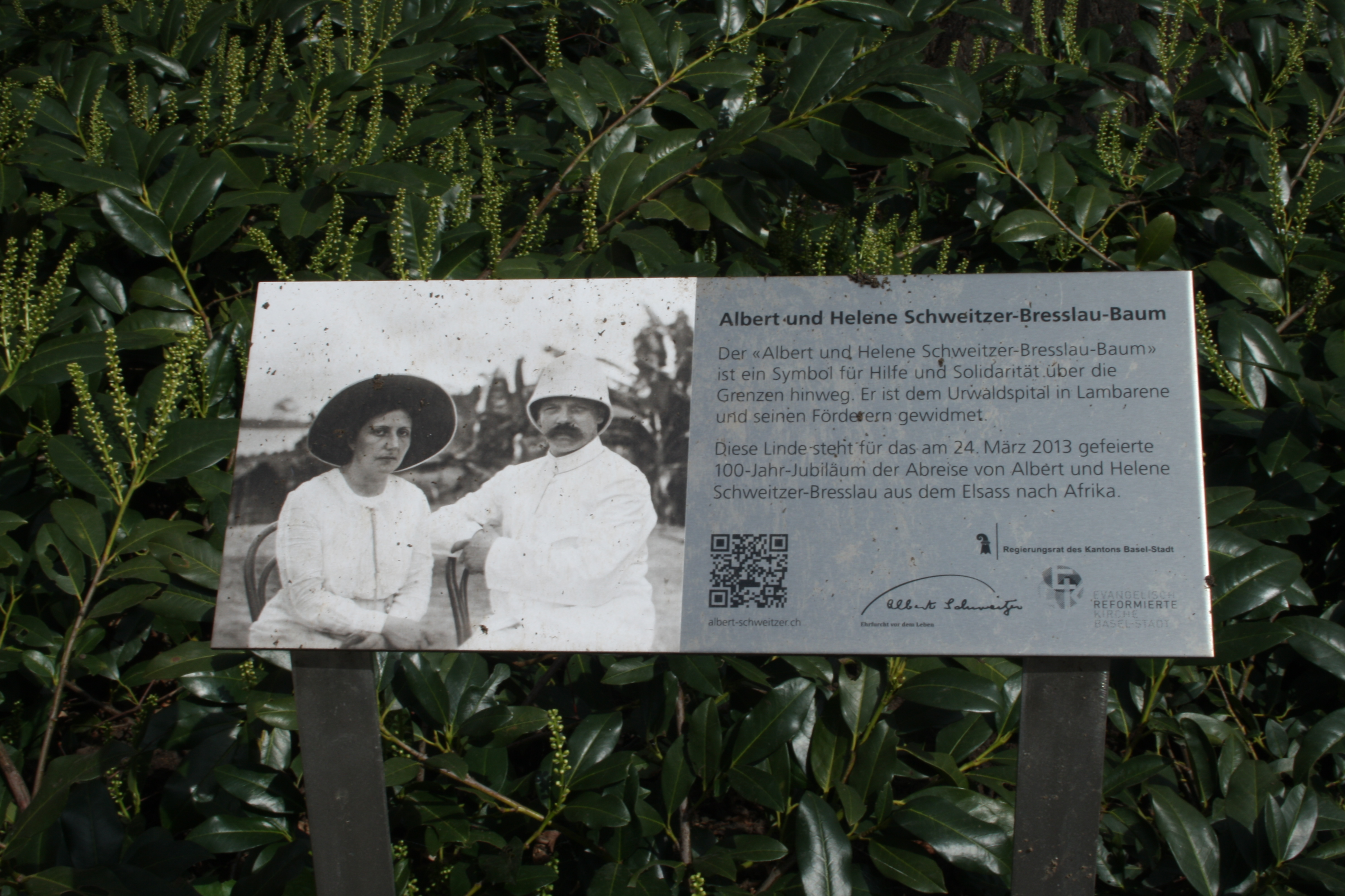 siehe Name